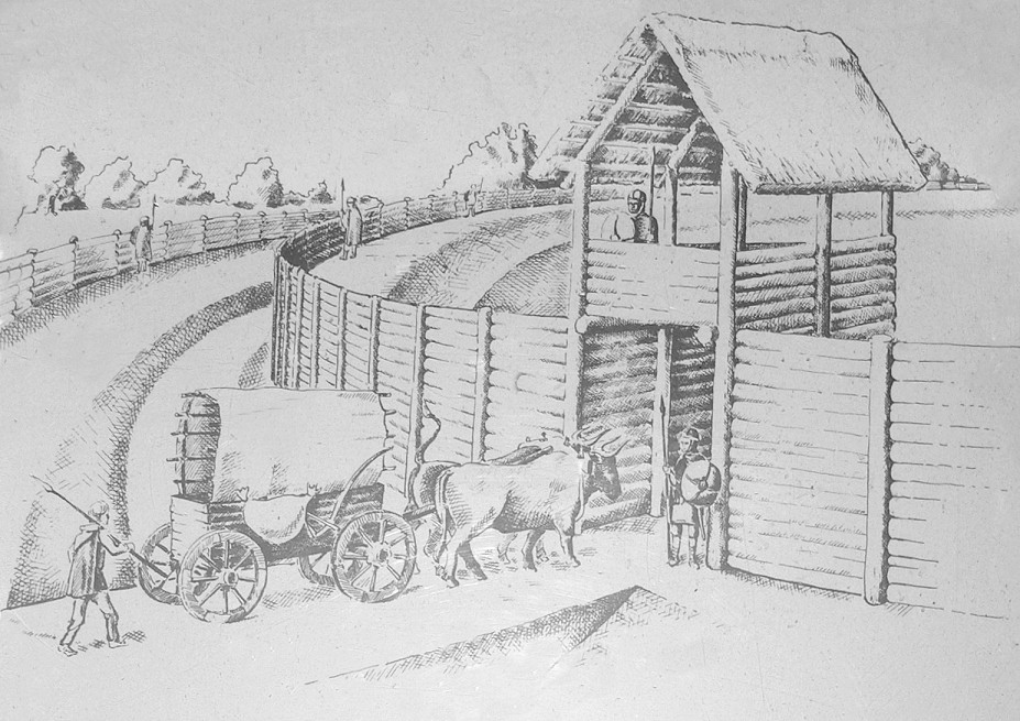 Rekonstruiertes Tor der Düsselburg